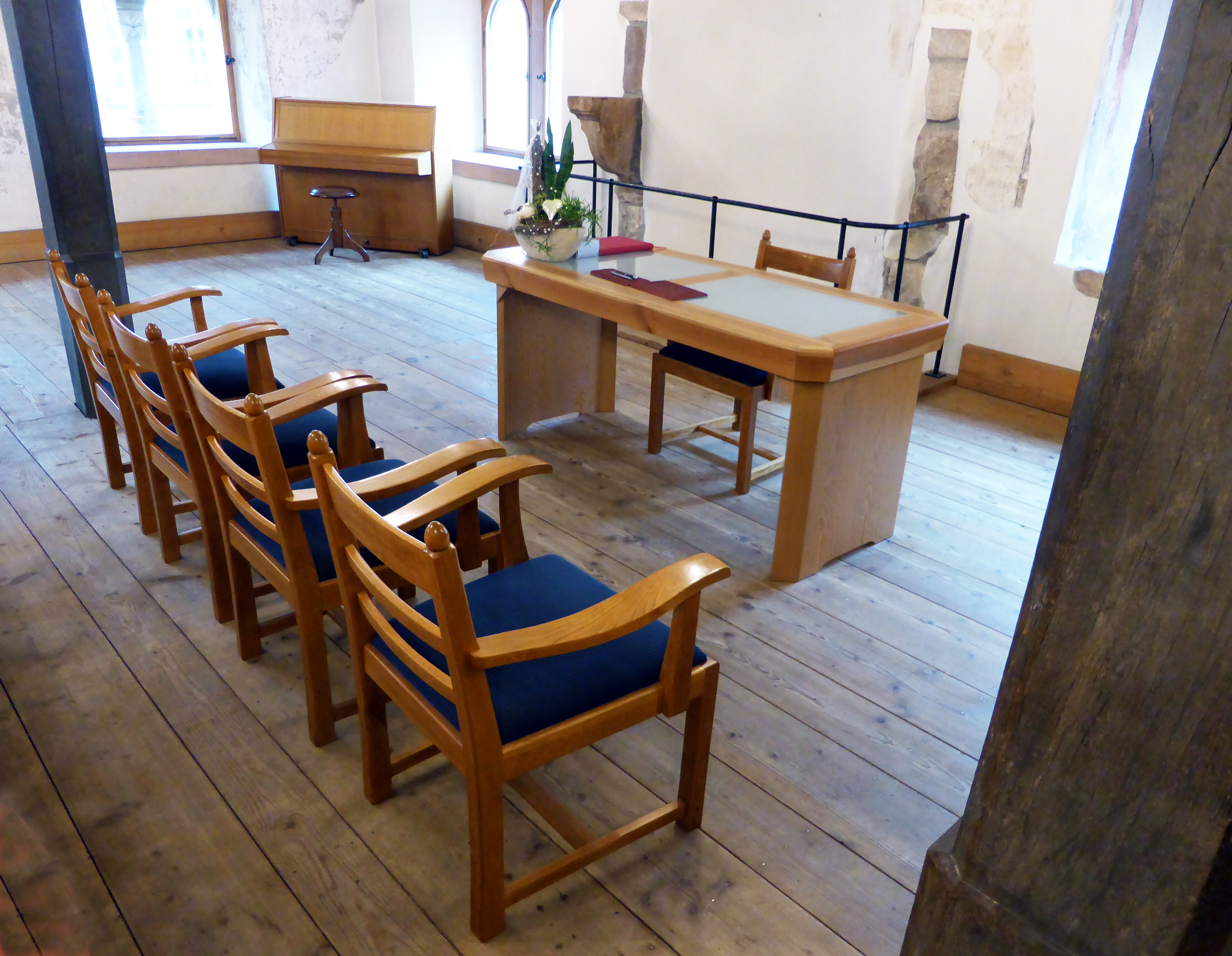 Romanisches Steinhaus in Seligenstadt (Trauzimmer)